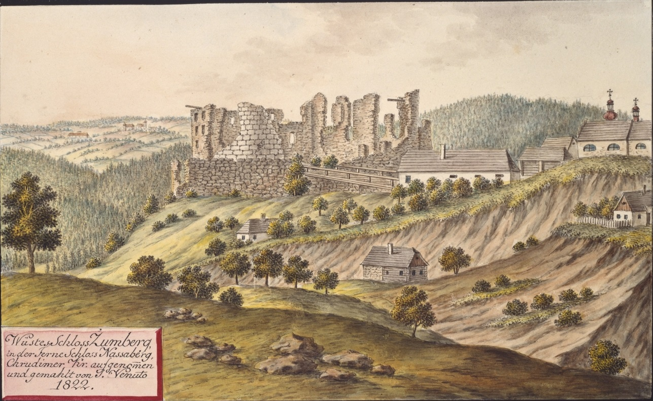 Hrad Žumberk. Wüstes Schloss Zumberg, in der Ferne Schloss Nassaberg, Chrudimer Kr. aufgenommen und gemahlt von J. Venuto 1822